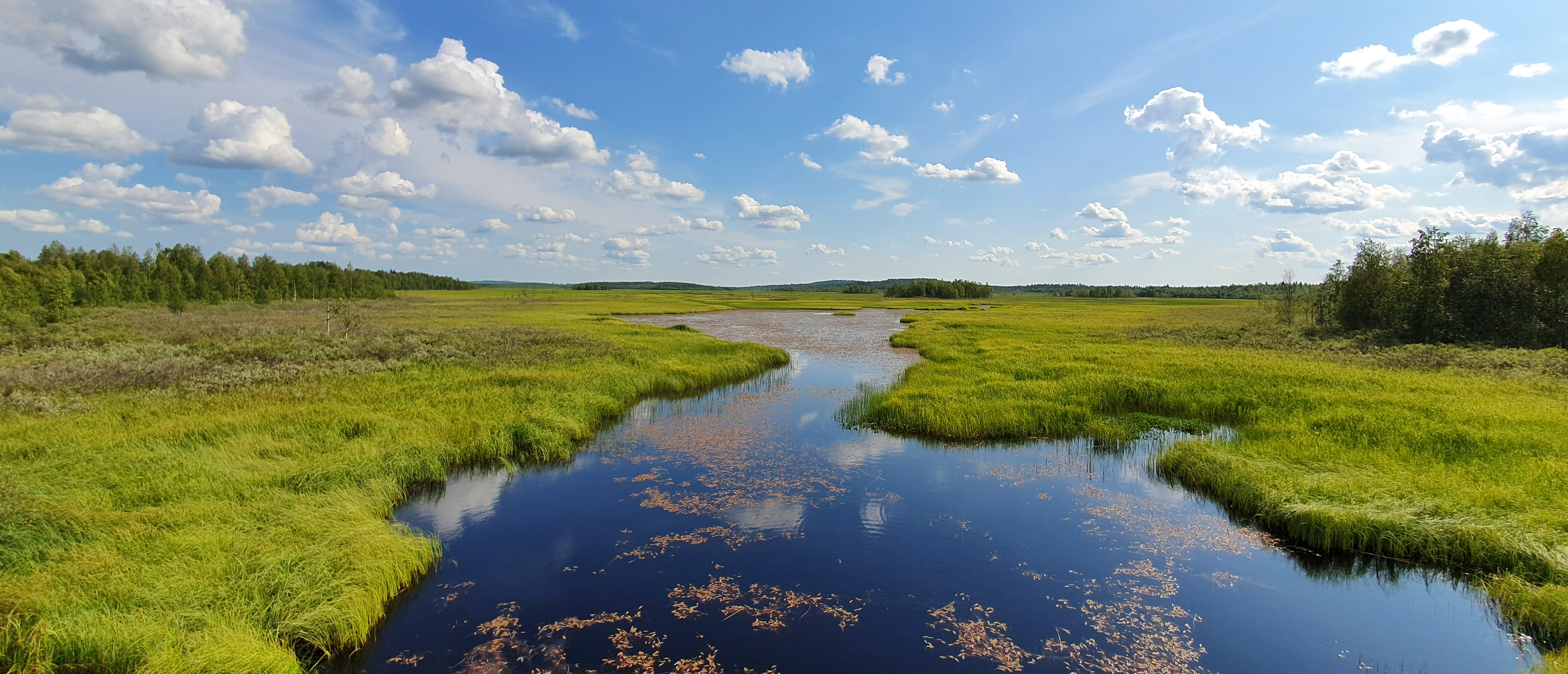 Jierijärvi är en sjö i Pajala kommun i Norrbotten och ingår i Kalixälvens huvudavrinningsområde. Sjön har i slutet av 1800-talet samt under 1930-talets torrlagts för att skapa odlingsmark.